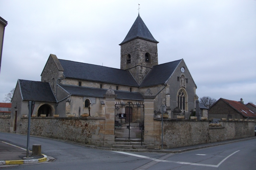 Vue de l'église du village Les Meneux.